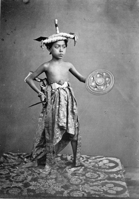 Foto. Portret van jongen uit Madoera, gekleed in traditioneel krijgstenue.